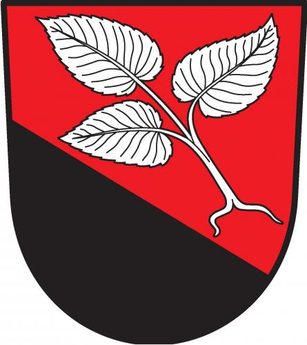 Znak obce Staré Město pod Landštejnem